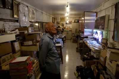 Fotografía: DateCuenta